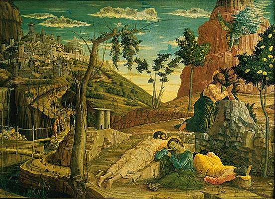 Le Christ au jardin des Oliviers par Andrea Mantegna. Exposé au musée des Beaux-Arts de Tours.